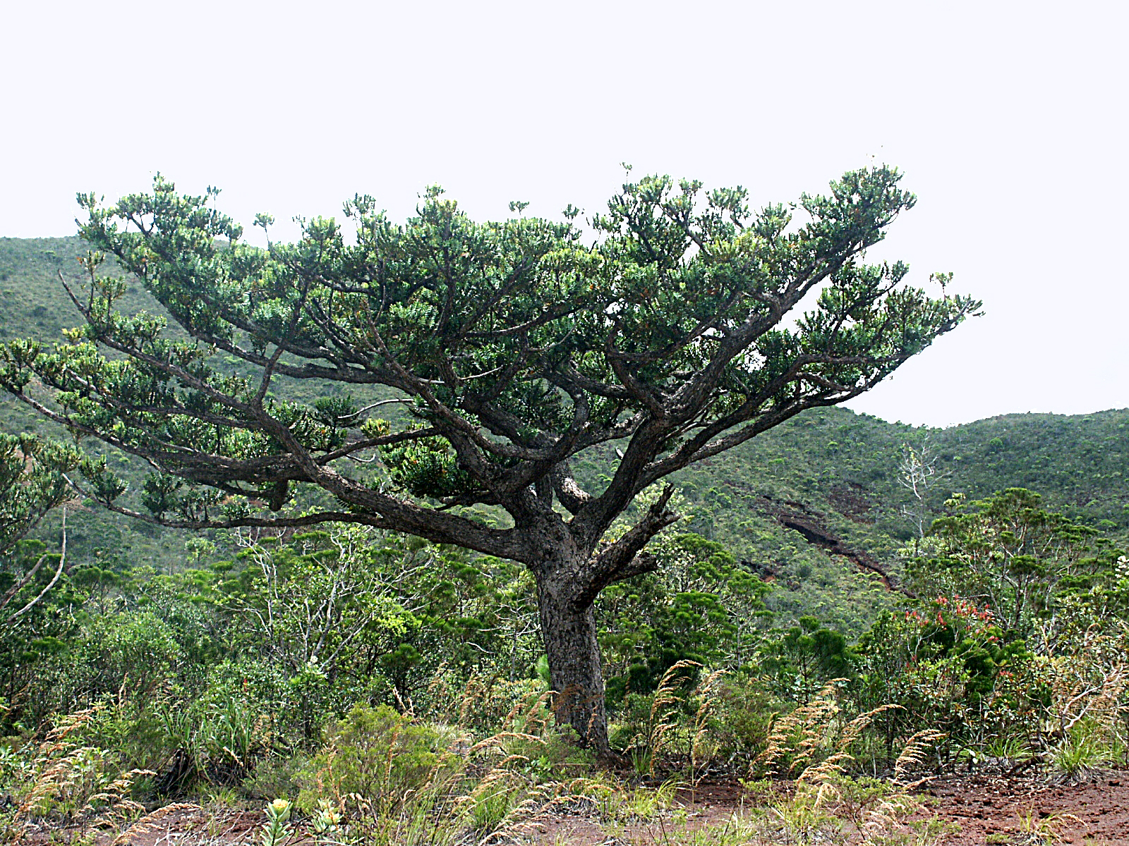 Agathis ovata à proximité du col de Prony - Sud de Province Sud - Nouvelle-Calédonie. Noter la présence d'assez jeune Gymnostoma deplancheanum.